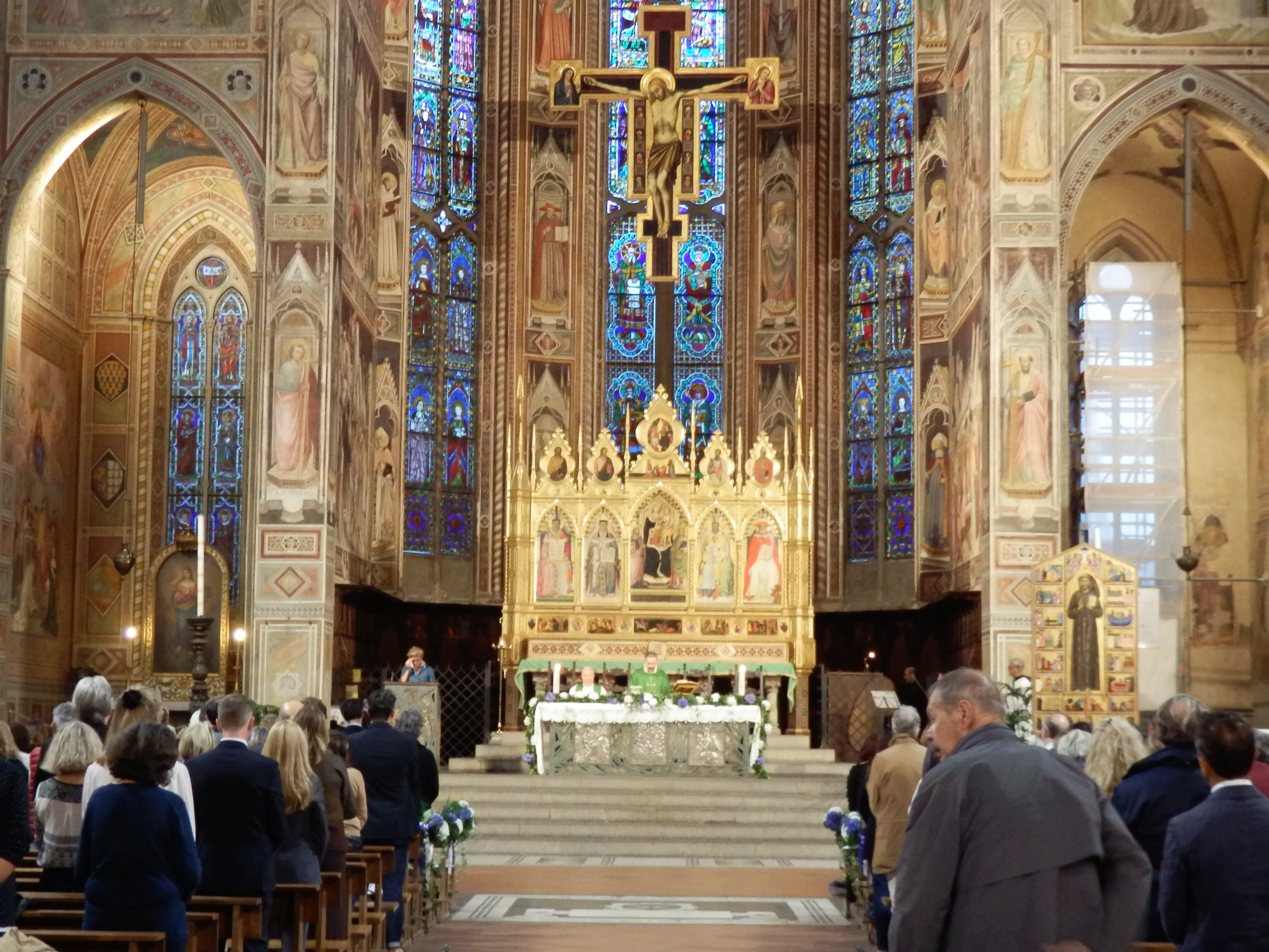 Messa in commemorazione di Jane Fortune, Basilica di Santa Croce